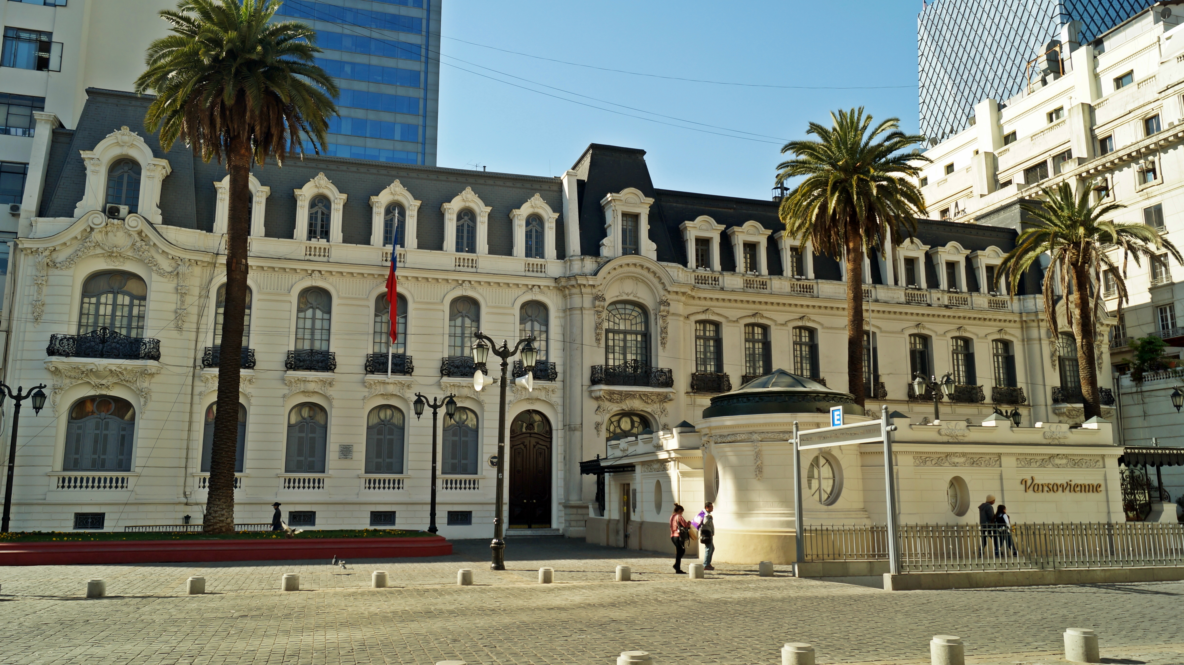 Plazoleta Patricio Mekis e inmuebles circundantes This is a photo of a national monument in Chile: 815